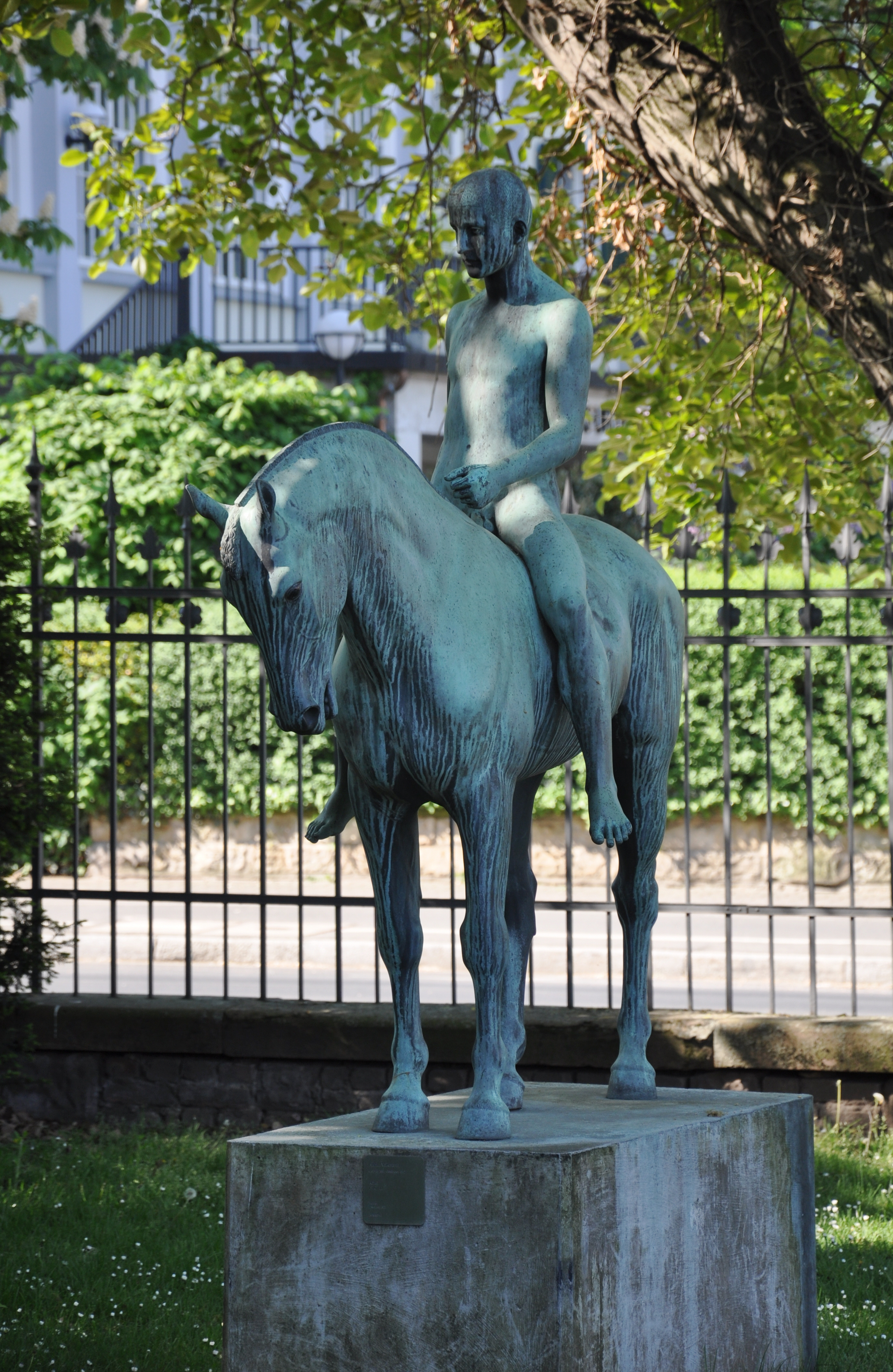 Frankfurt am Main, Skulpturengarten des Städel, Arthur Volkmann (1851–1941): Reiter, 1910/1911, Bronze, erworben 1921, Inv. Nr. SGP 42